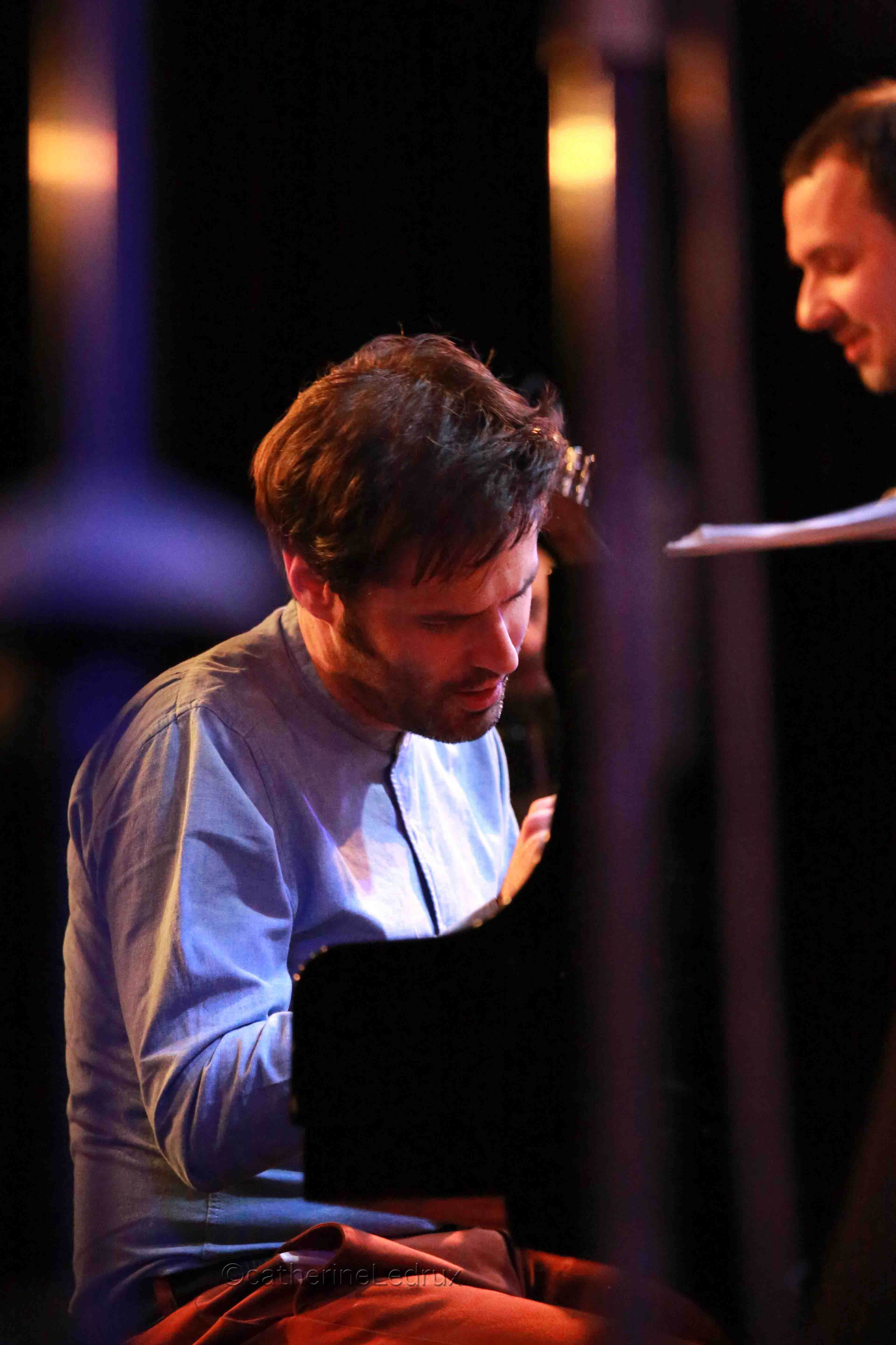 Le pianiste Paul Lay en train de jouer